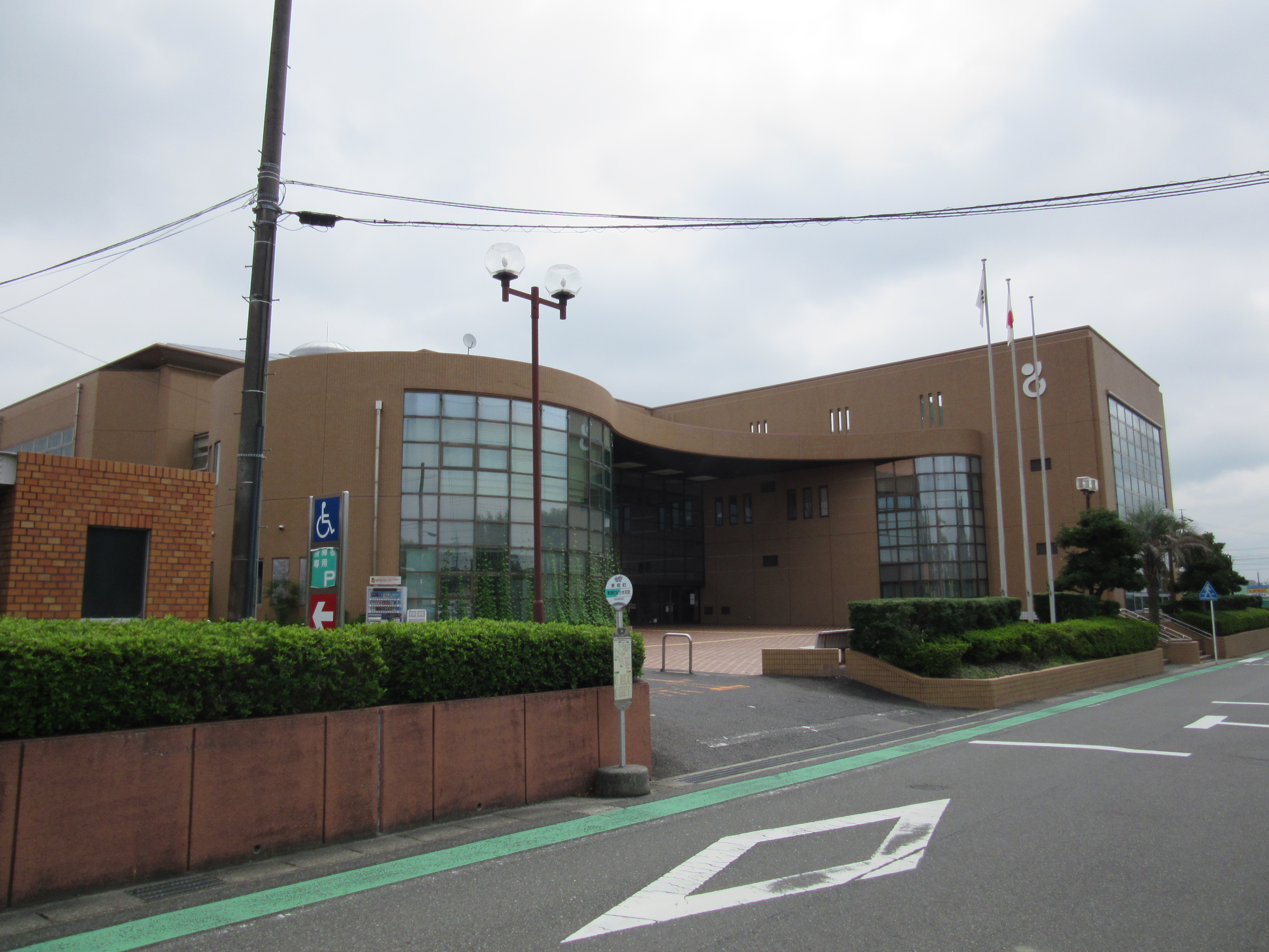 東郷町総合体育館